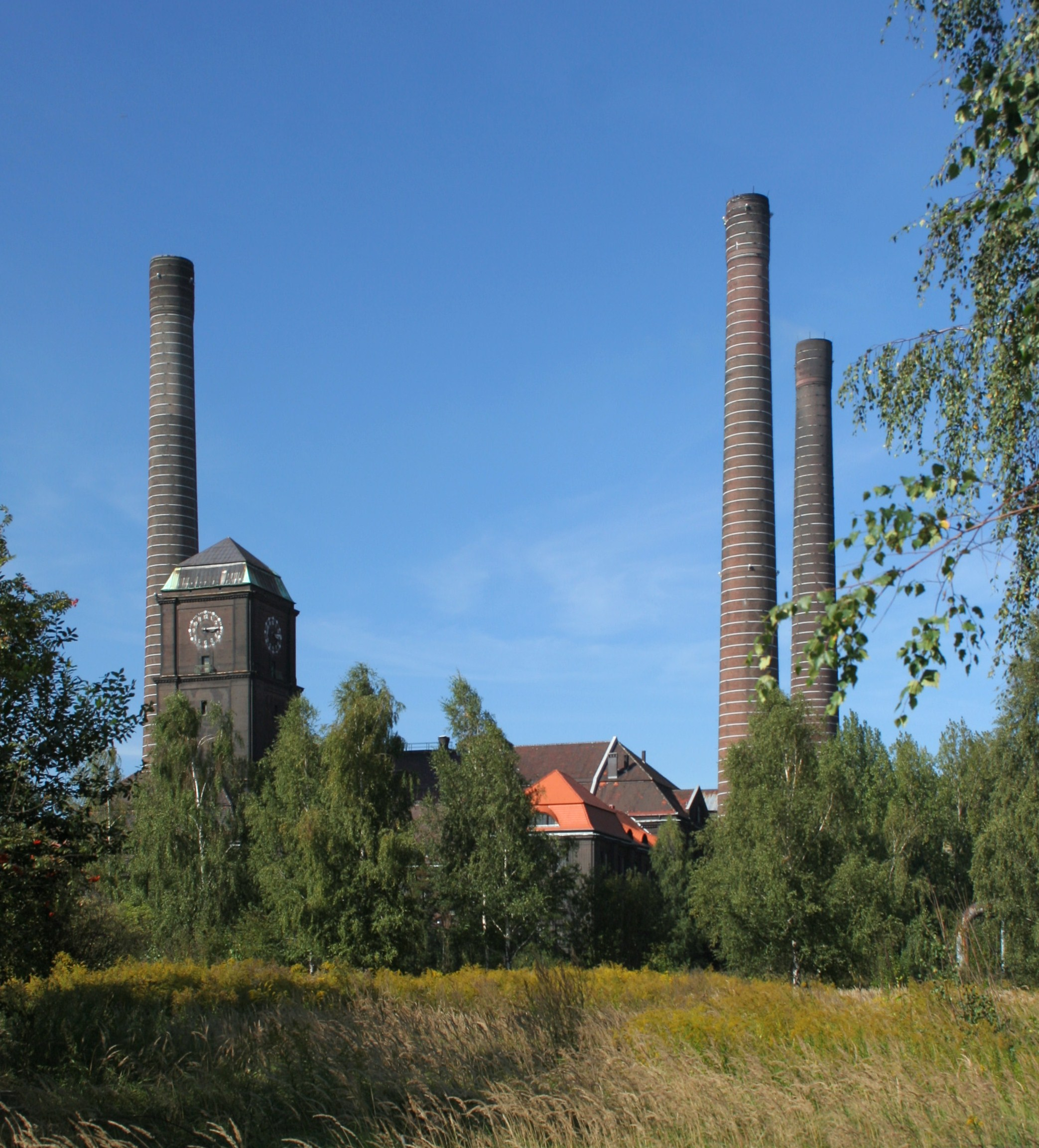 Elektrociepłownia Szombierki.